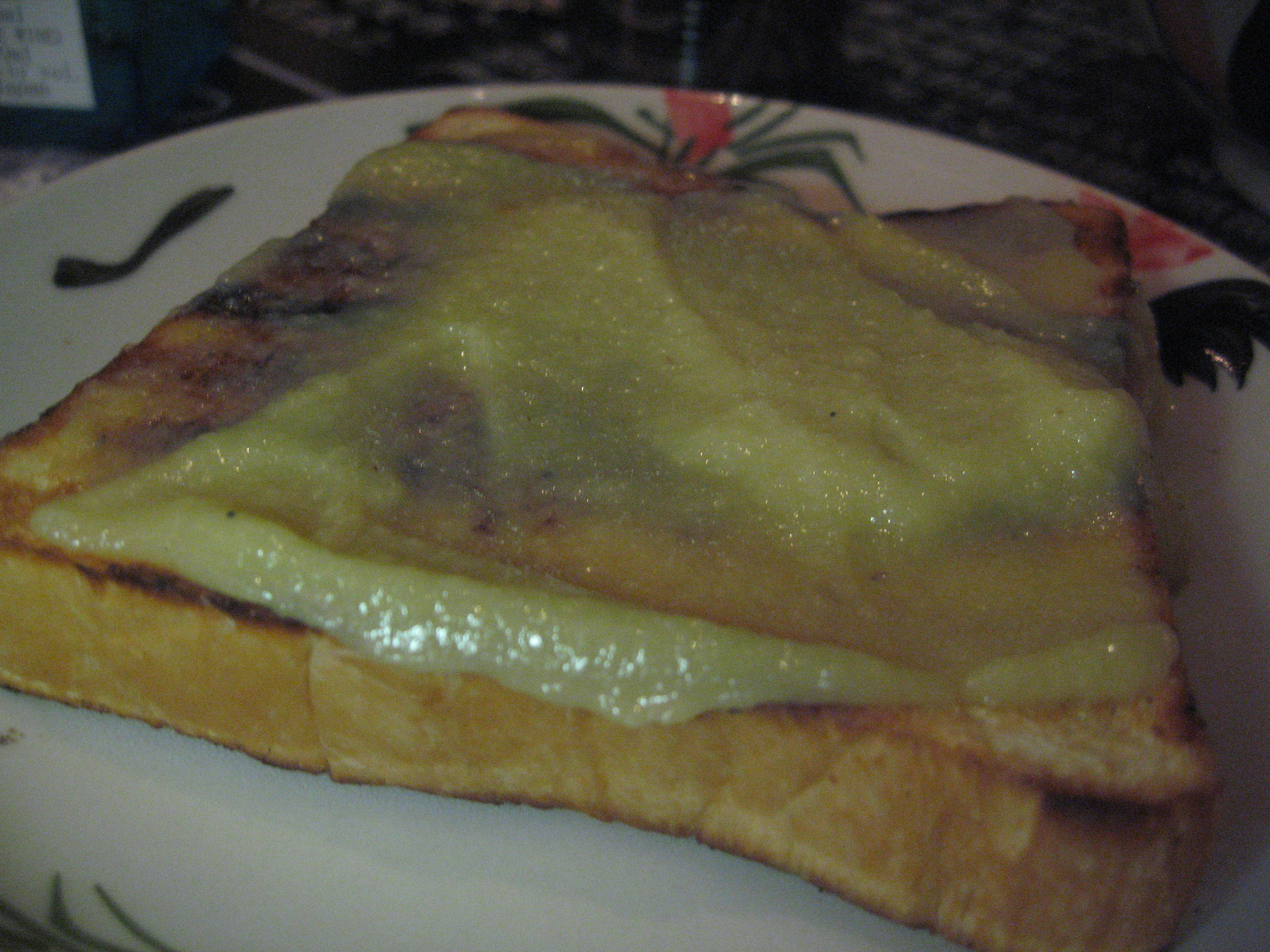 With kaya, a coconut egg jam @ Ping